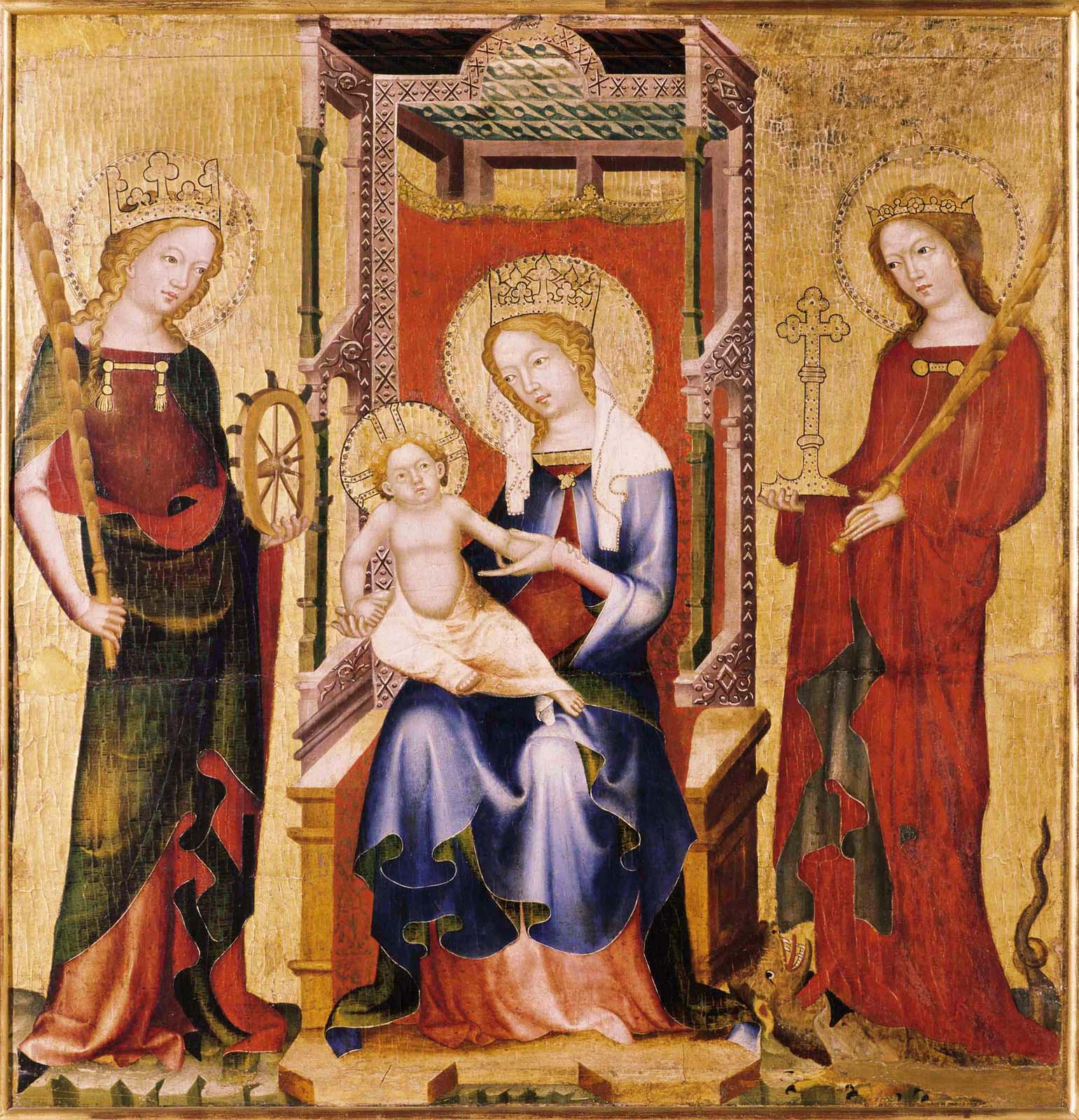 Madona mezi sv. Kateřinou a sv. Markétou, Alšova jihočeská galerie v Hluboké nad Vltavou